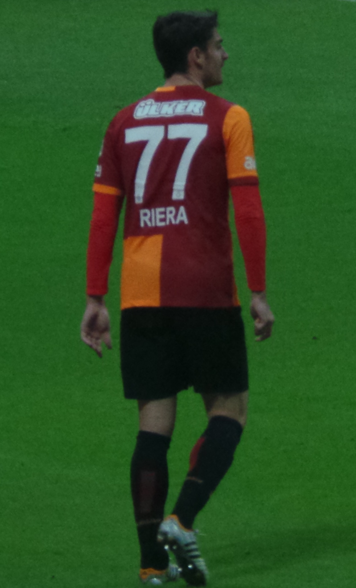 Albert Riera 2013-14 sezonunda giydiği 77 numaralı formasıyla Türk Telekom Arena'daki son maçında.